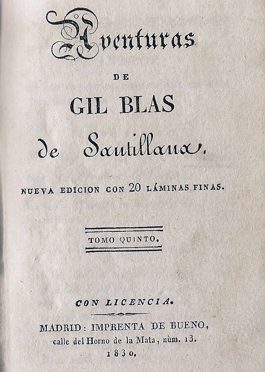 Aventuras de Gil Blas de Santillana, edición española publicada en cinco tomos por la imprenta de Bueno, en Madrid en 1830. Contiene cuatro láminas de ilustraciones grabadas.